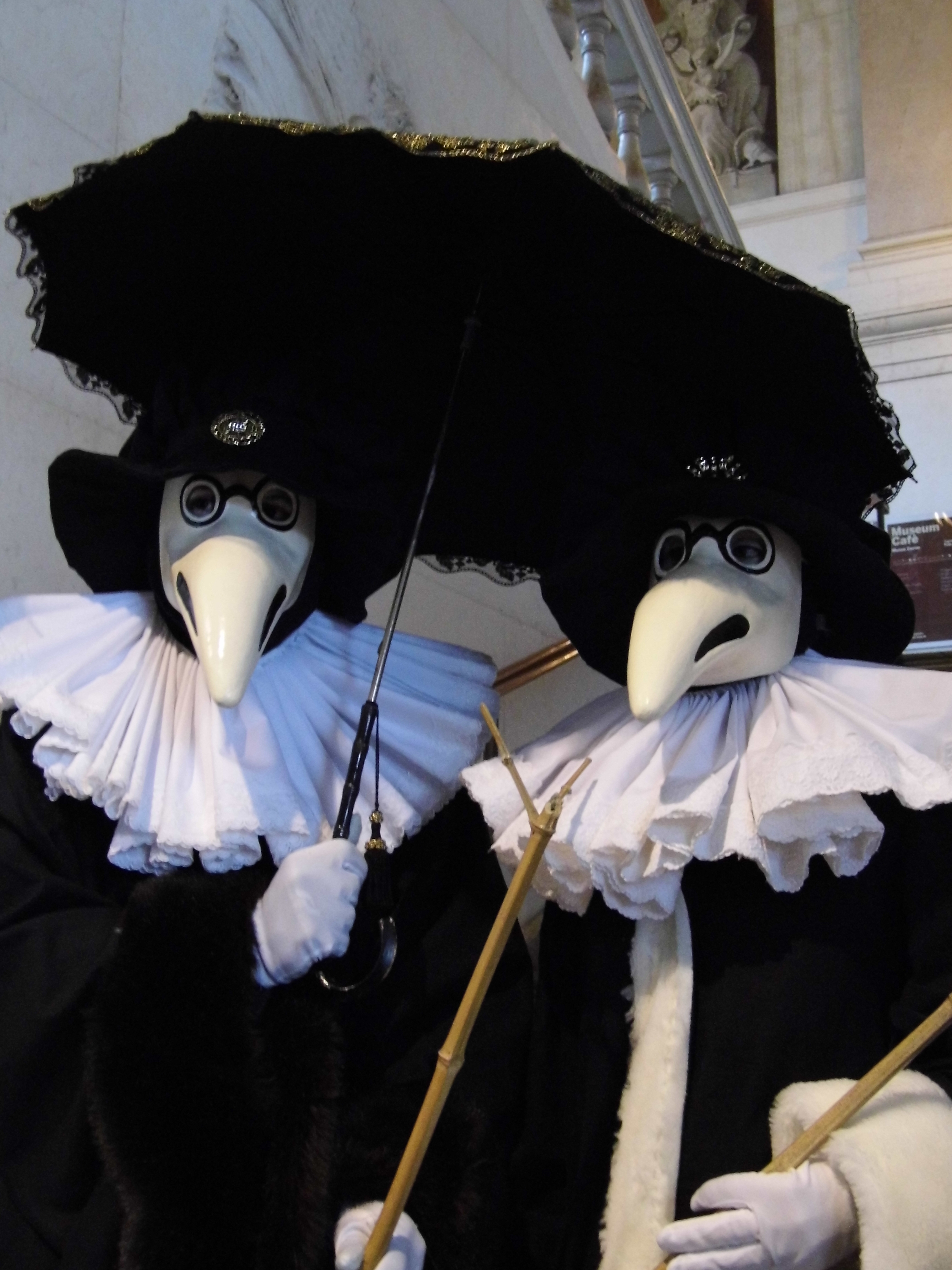 Karneval in Venedig